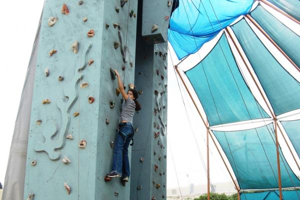 טיפוס על קיר בפארק אתגרים טייפון